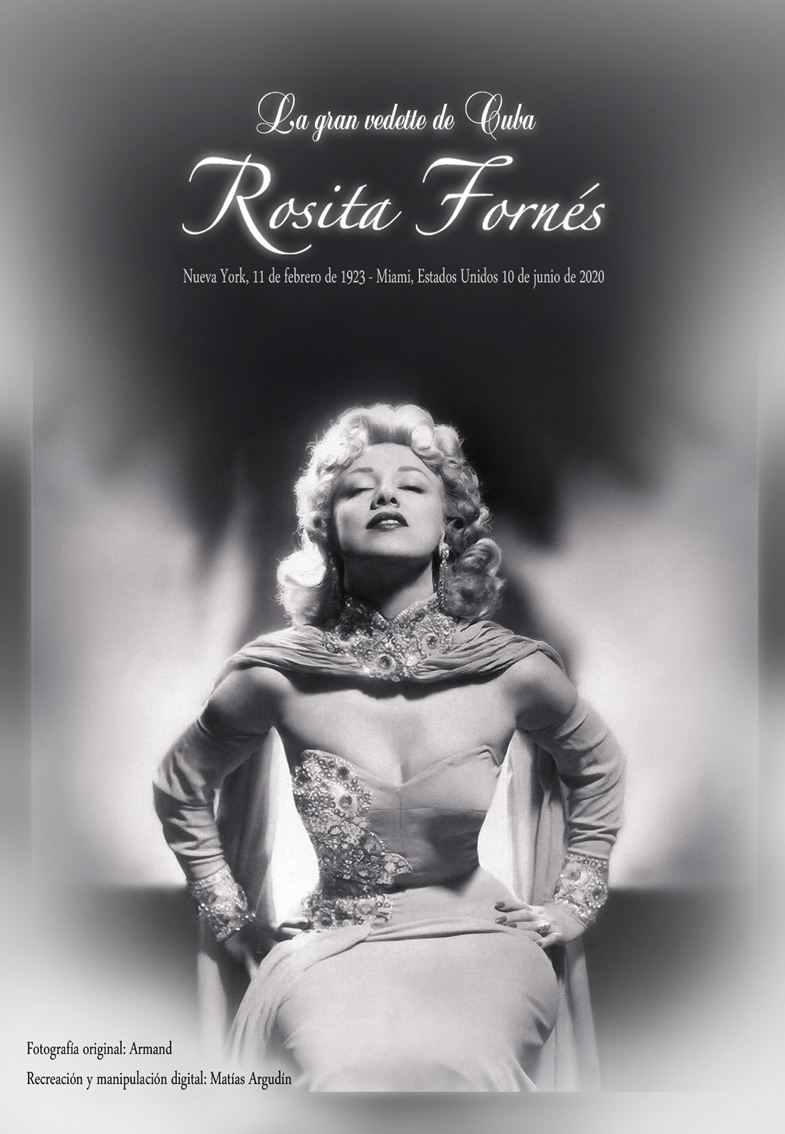 La gran vedette de Cuba Rosita Fornés